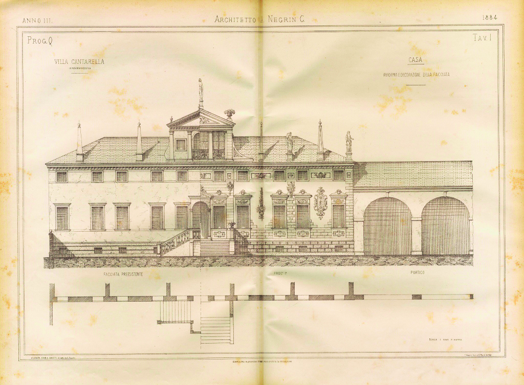 tavola comparativa del progetto di restauro di Villa Manin Cantarella